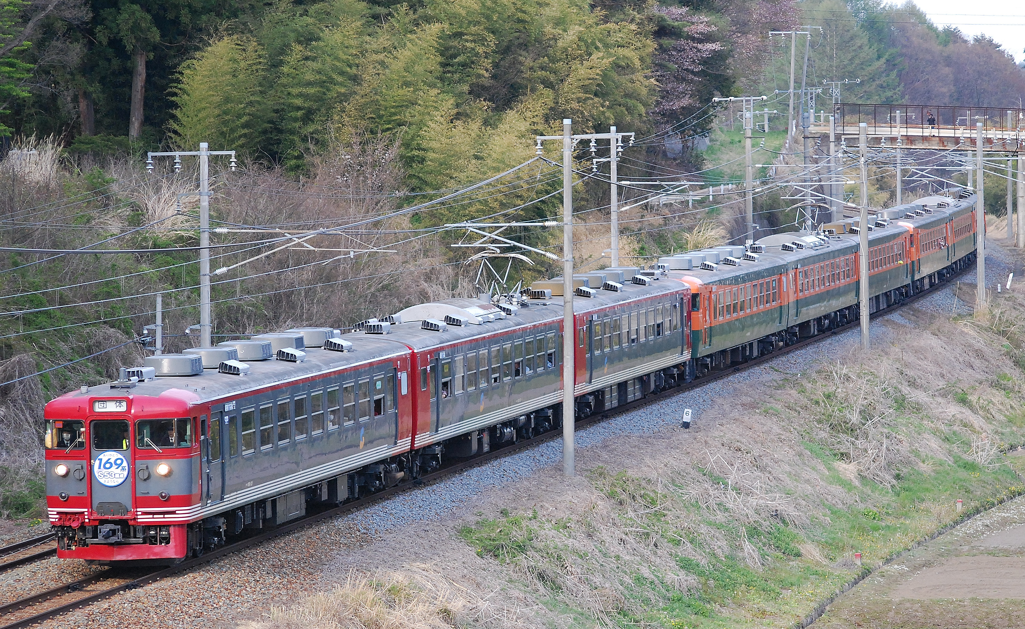 しなの鉄道169系ファイナル列車での団体臨時列車しての運用に入った、しなの鉄道色のS53編成と湘南色のS51+S52編成の9両編成。